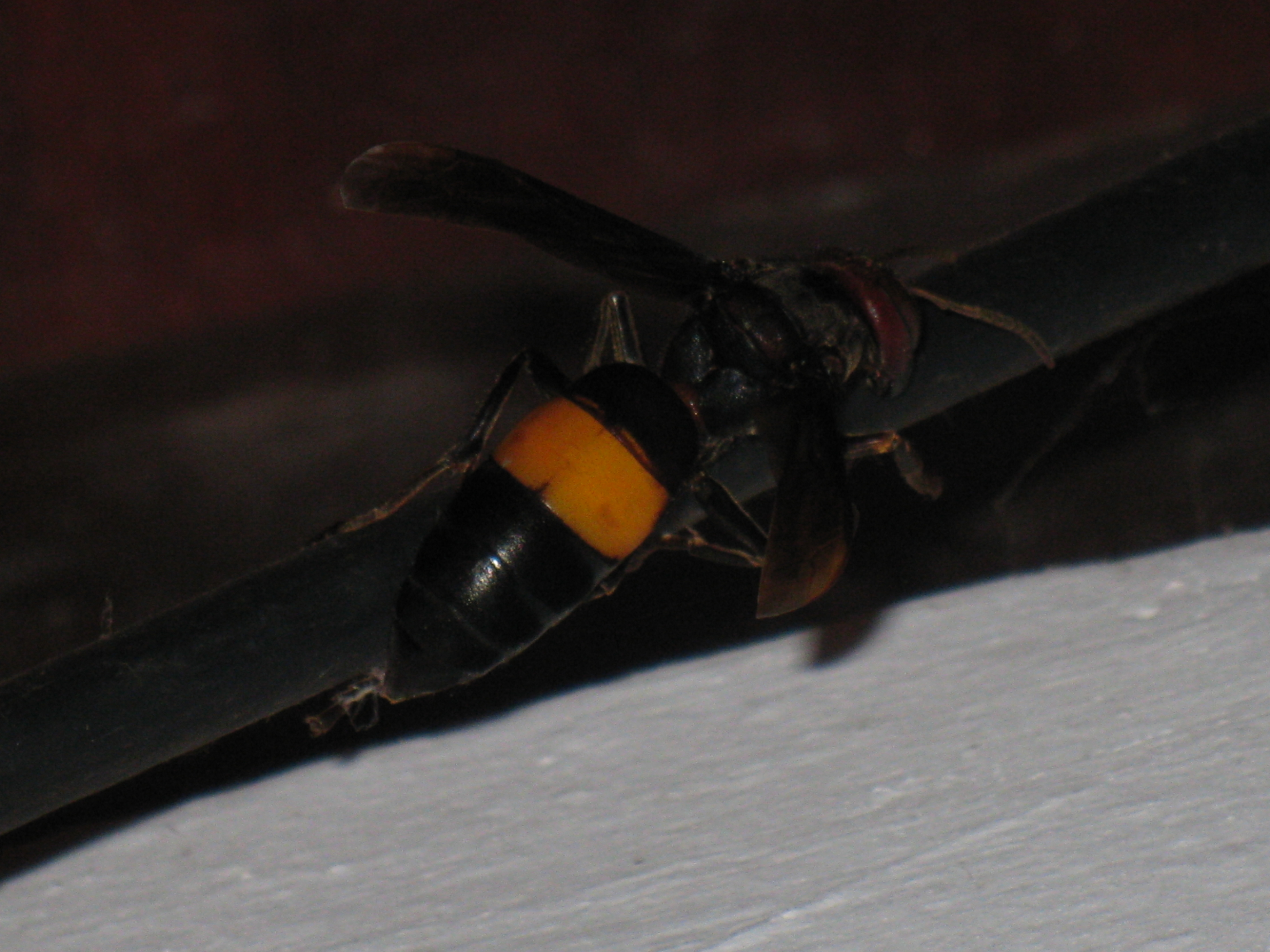 മലബാറിൽ ഈ പ്രാണിയെ കടന്നൽ എന്നു വിളിക്കുന്നു. ഒരു മൂന്ന് നാലു കടന്നലുകൾ ഒരുമിച്ചു കുത്തിയാൽ കുത്തിയ ആൾ മരിക്കും എന്ന് പറയപ്പെടുന്നു.